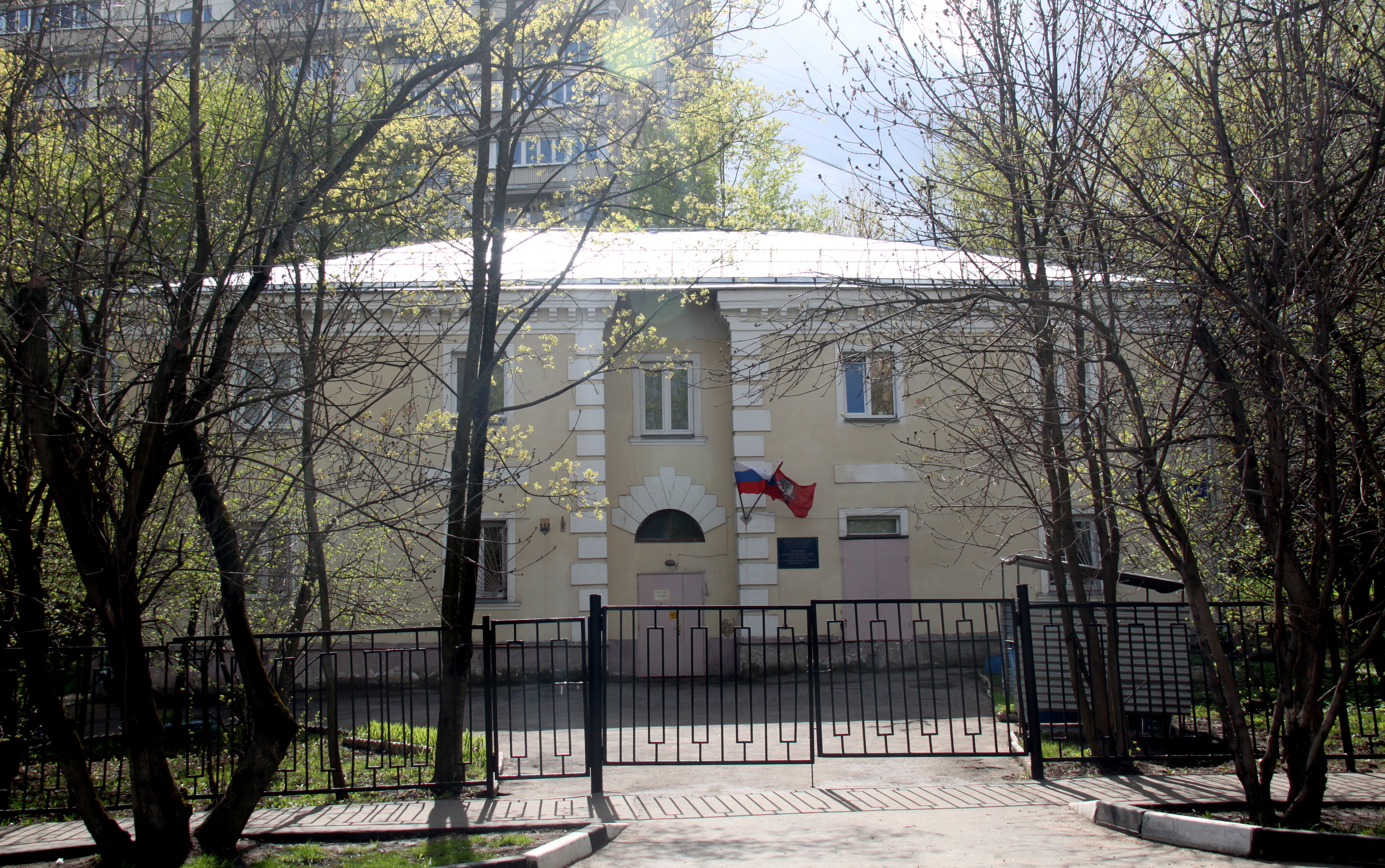 Лечебно-производственные мастерские (бывшее ЛТП)